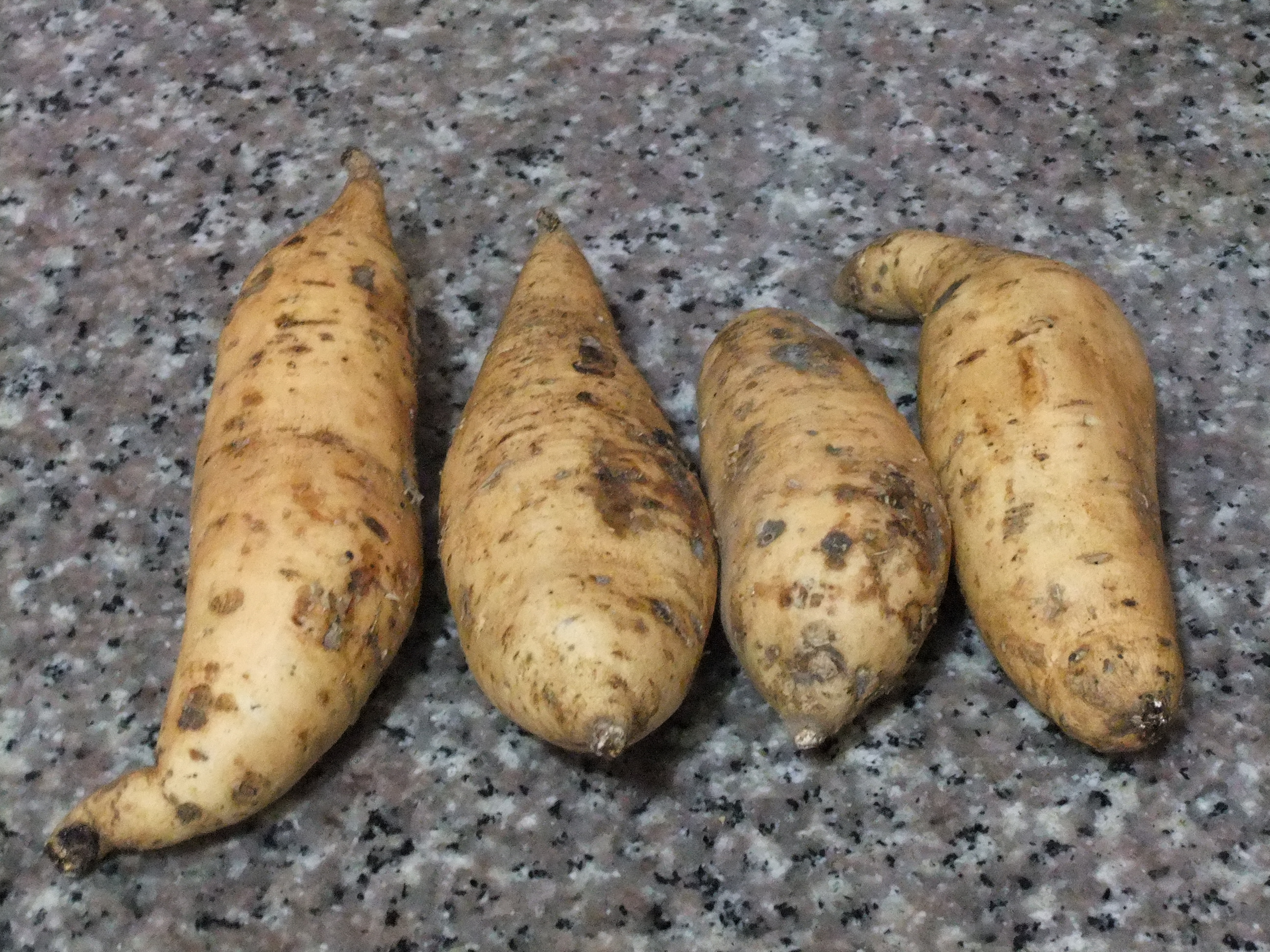 Ubi 'Cilembu', mentah